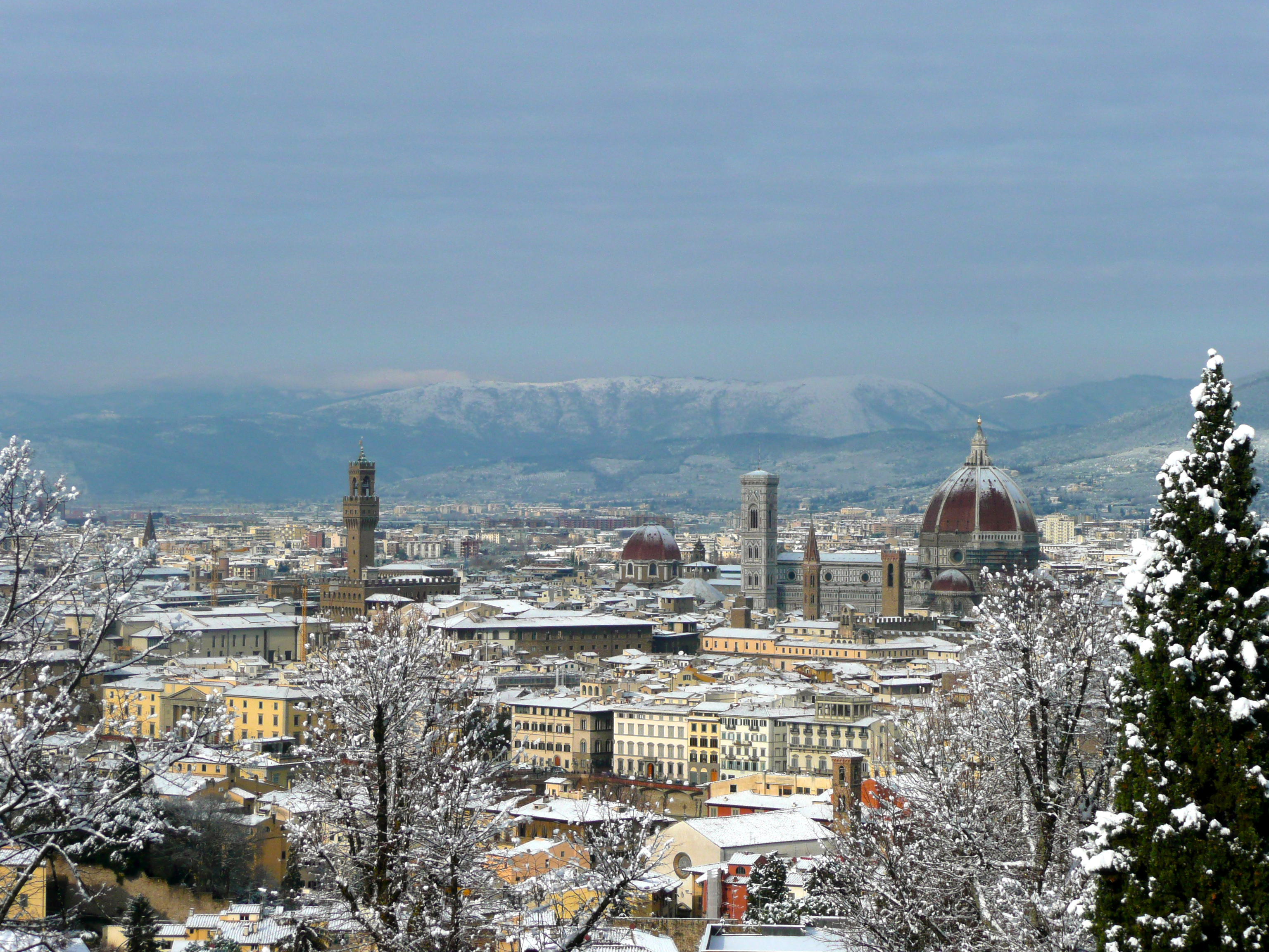 Photo de Florence prise en décembre 2010